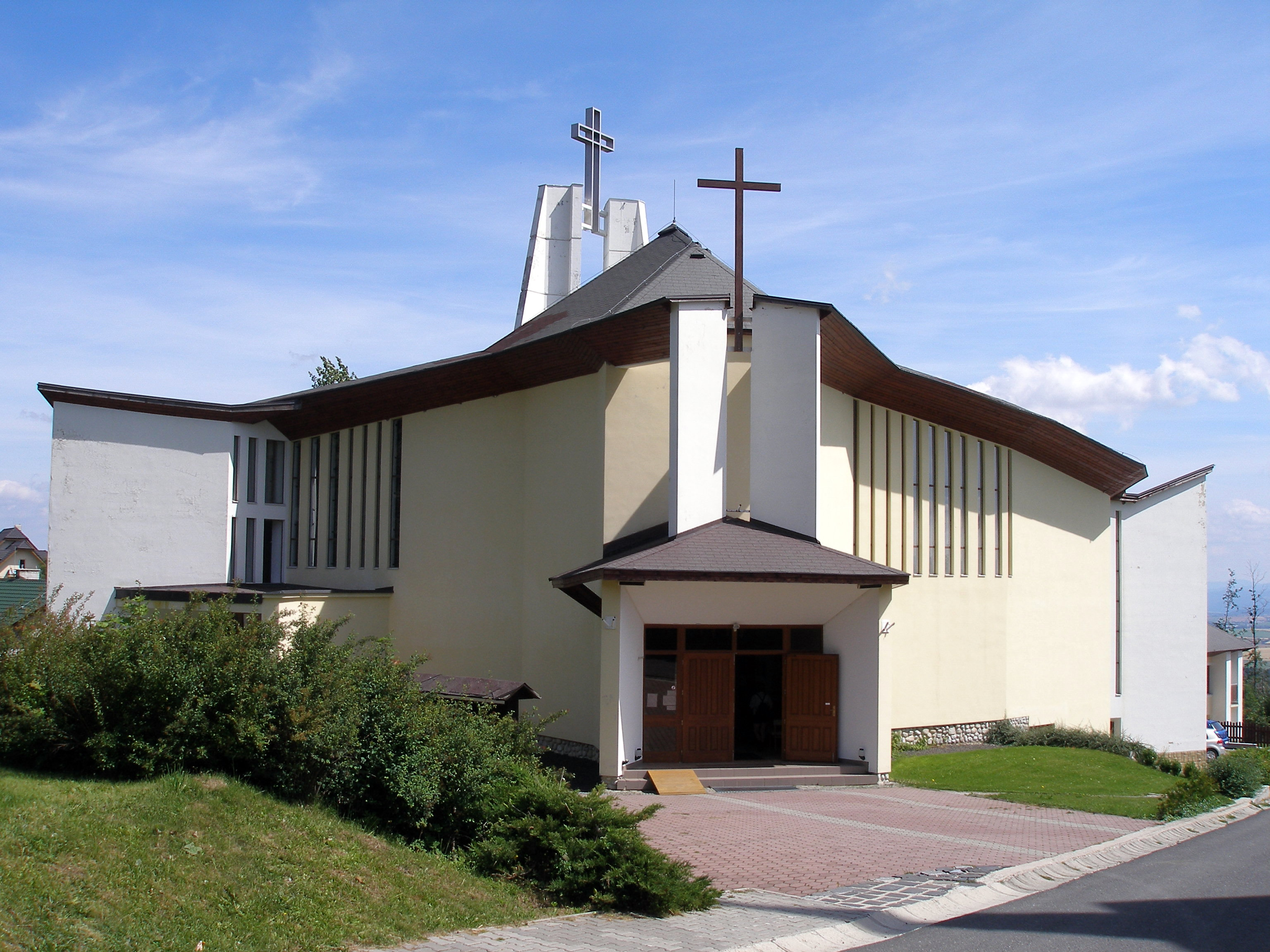 Tatranská osada Nový Smokovec, mesto Vysoké Tatry, okres Poprad